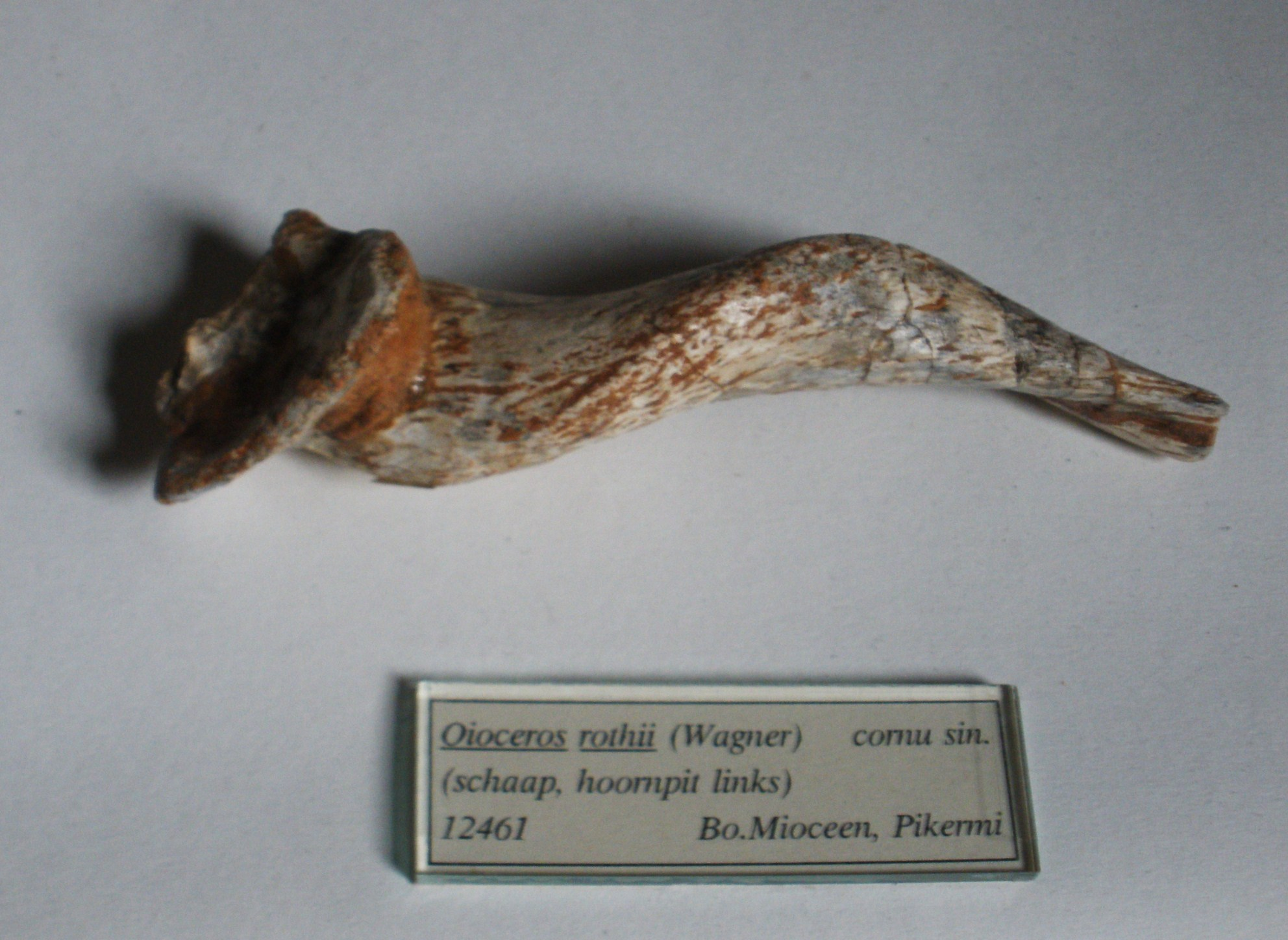 Fossil of Oioceros, an extinct bovid- Took the photo at Teylers Museum, Haarlem